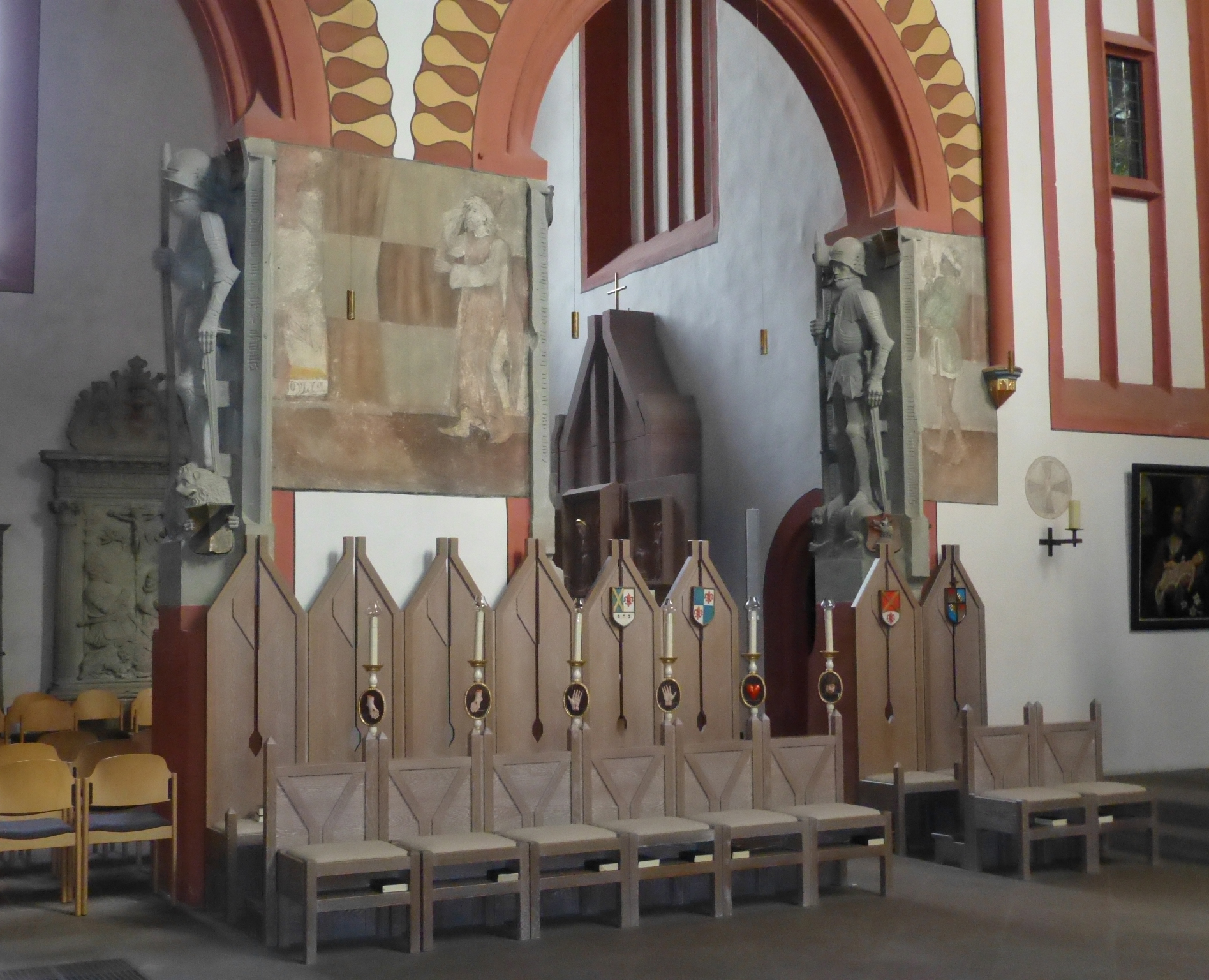 Rieneckerkapelle, St Andreas Pfarrkirche, Karlstadt am Main, Bayern.